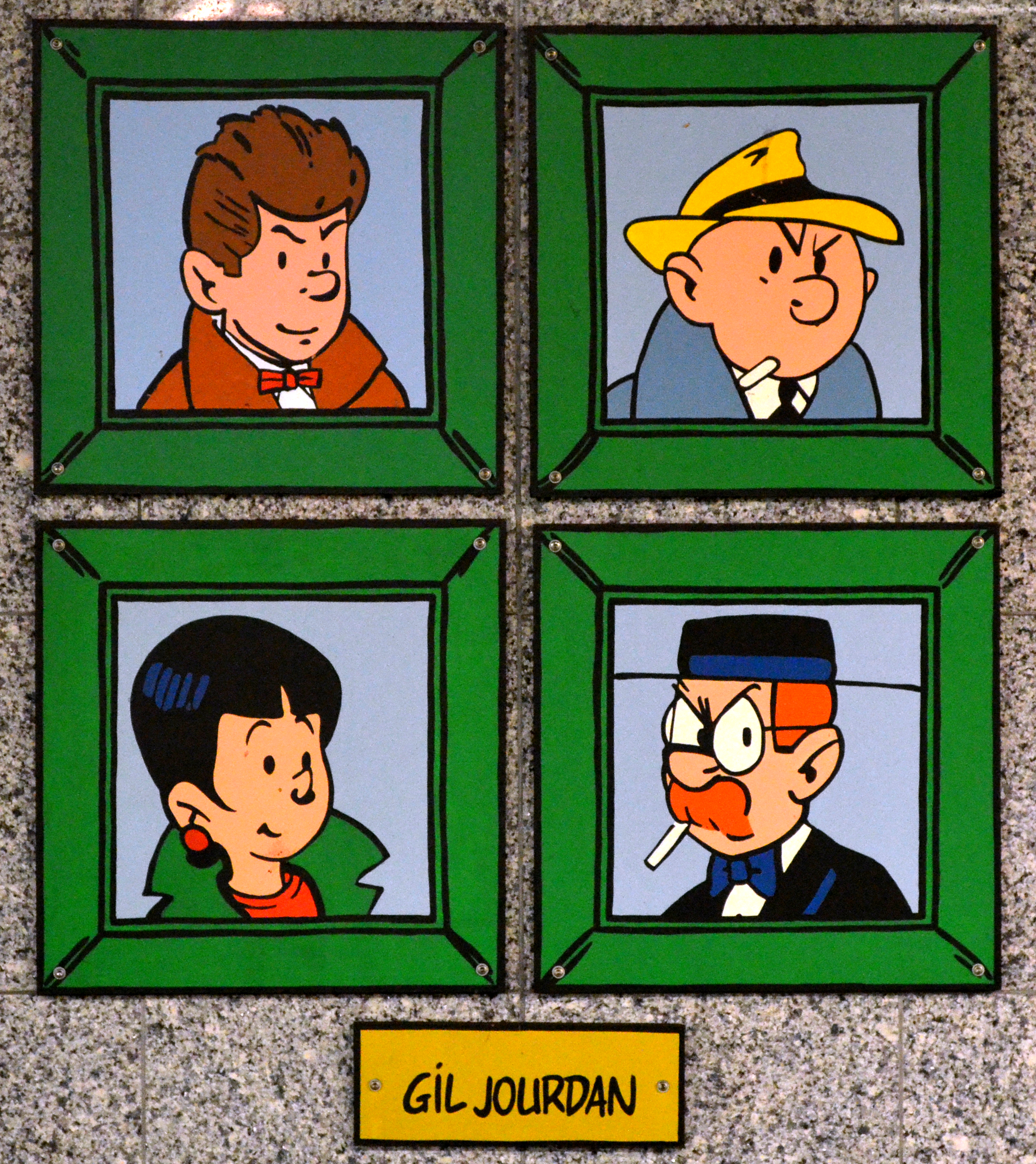 Charleroi (Belgique) - Station Janson du métro léger. Gil Jourdan.